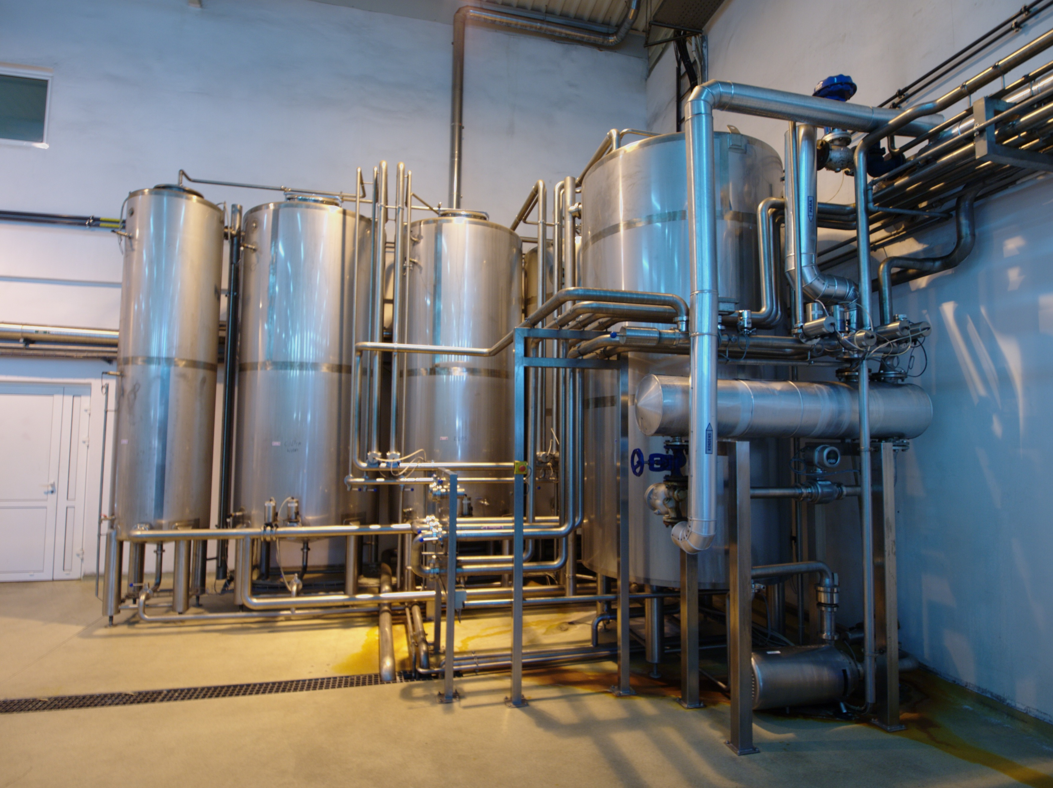 Browary Górnośląskie w Zabrzu. Rozlewnia piwa puszkowego.